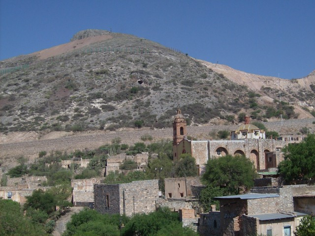 Panoramica Cerro de San Pedro en San Luis Potosí, México. Se destacan el cerro que da nombre al poblado y la iglesia principal.